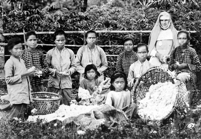 Repronegatief. Meisjes zuiveren kapok onder leiding van een rooms-katholieke zuster, Kai-eilanden.